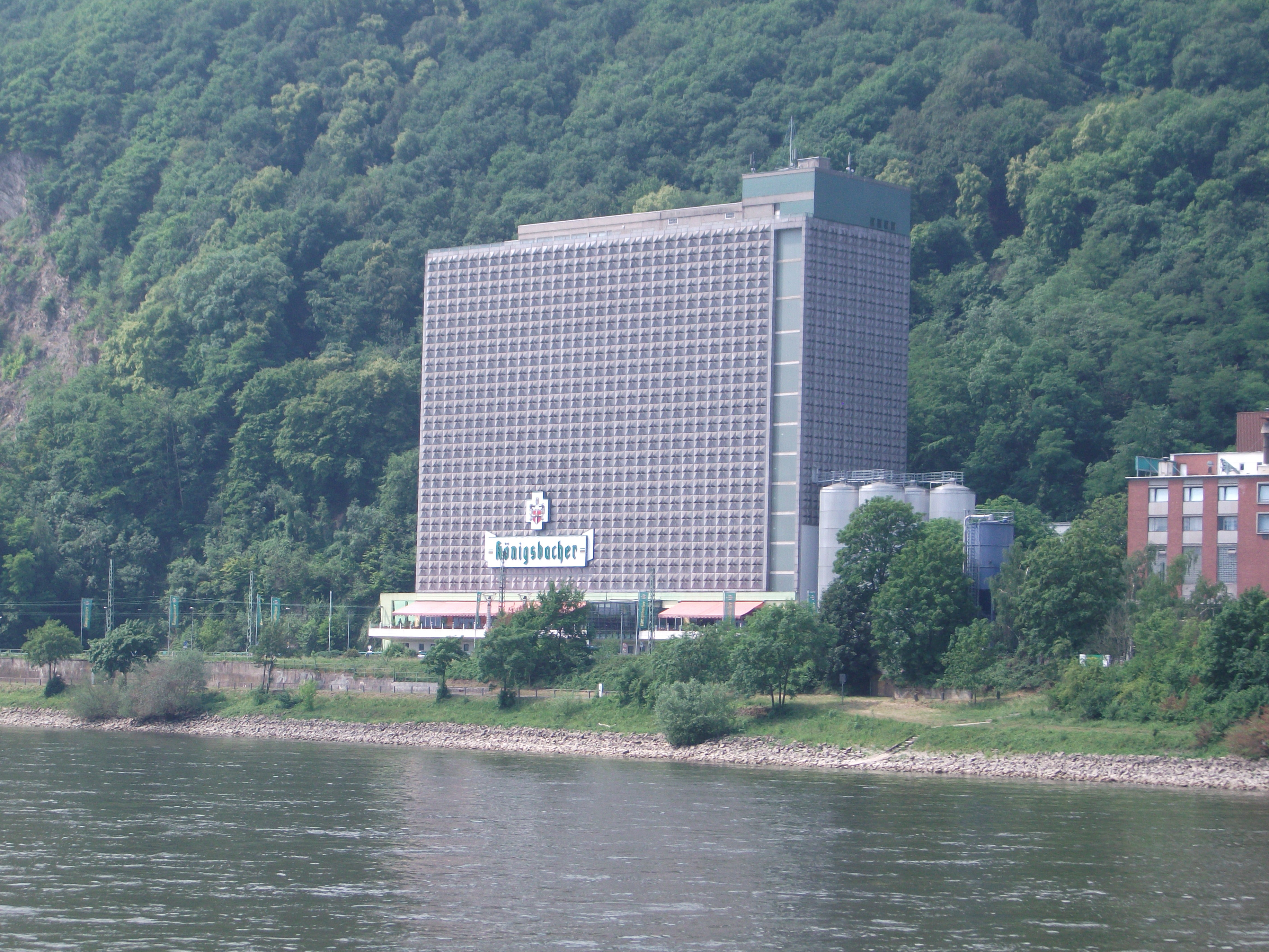 Koblenzer Brauerei Königsbacher vom Rhein gesehen